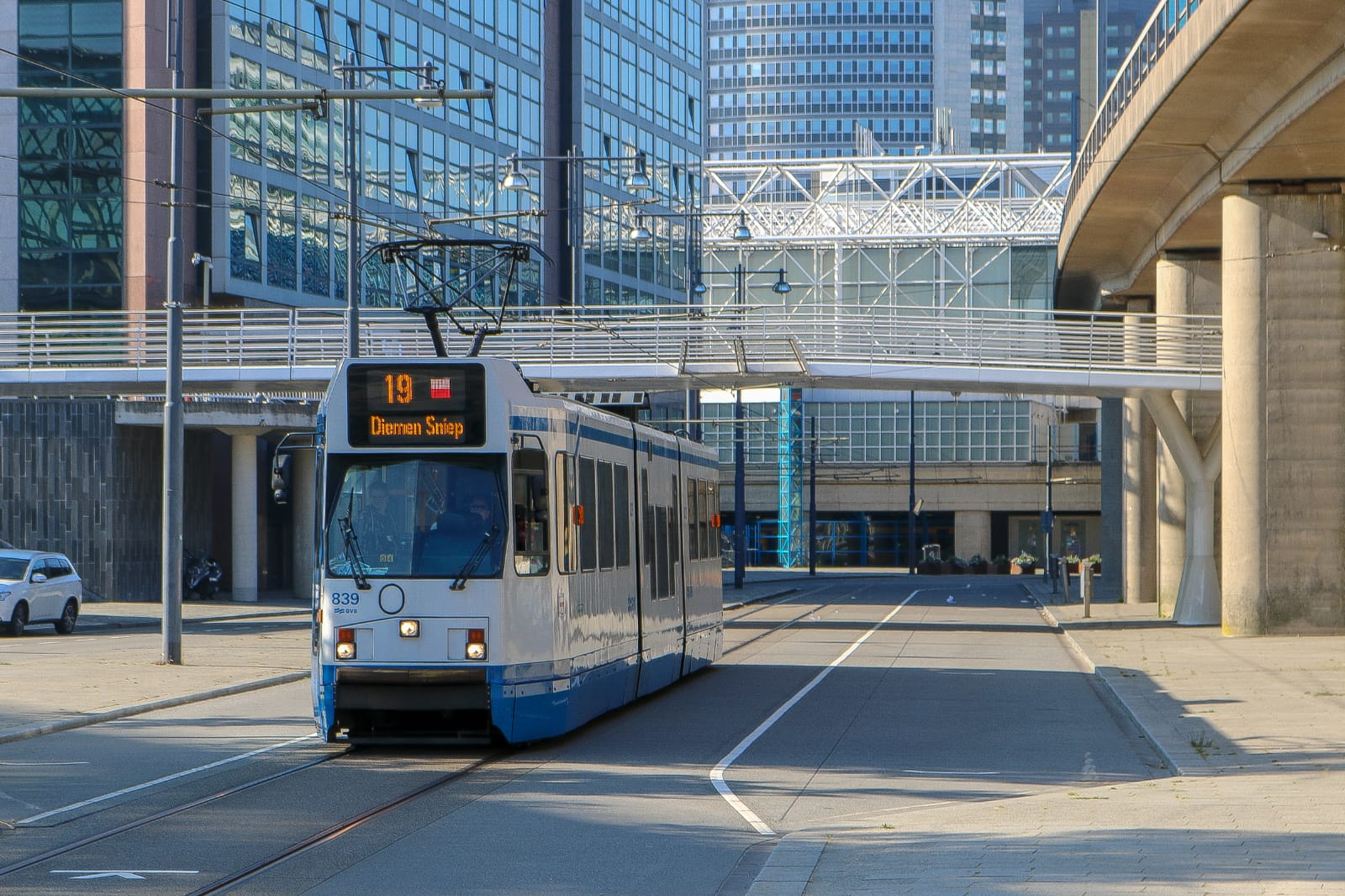 GVB 12G 839 vertrekt vanaf Station Sloterdijk naar Diemen Sniep